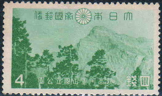 日本が発行した新高山国立公園4銭切手。現在は台湾で玉山と呼ばれている。